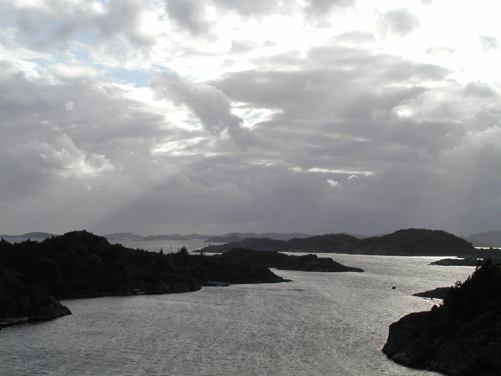 Schärenküste in Südnorwegen; aufgenommen 2006 in der Nähe von Mandal (genauer: auf der Brücke zu Skernøy) durch Kantor.JH